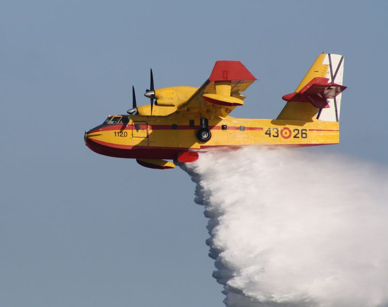 Canadair CL-215T, Vigo